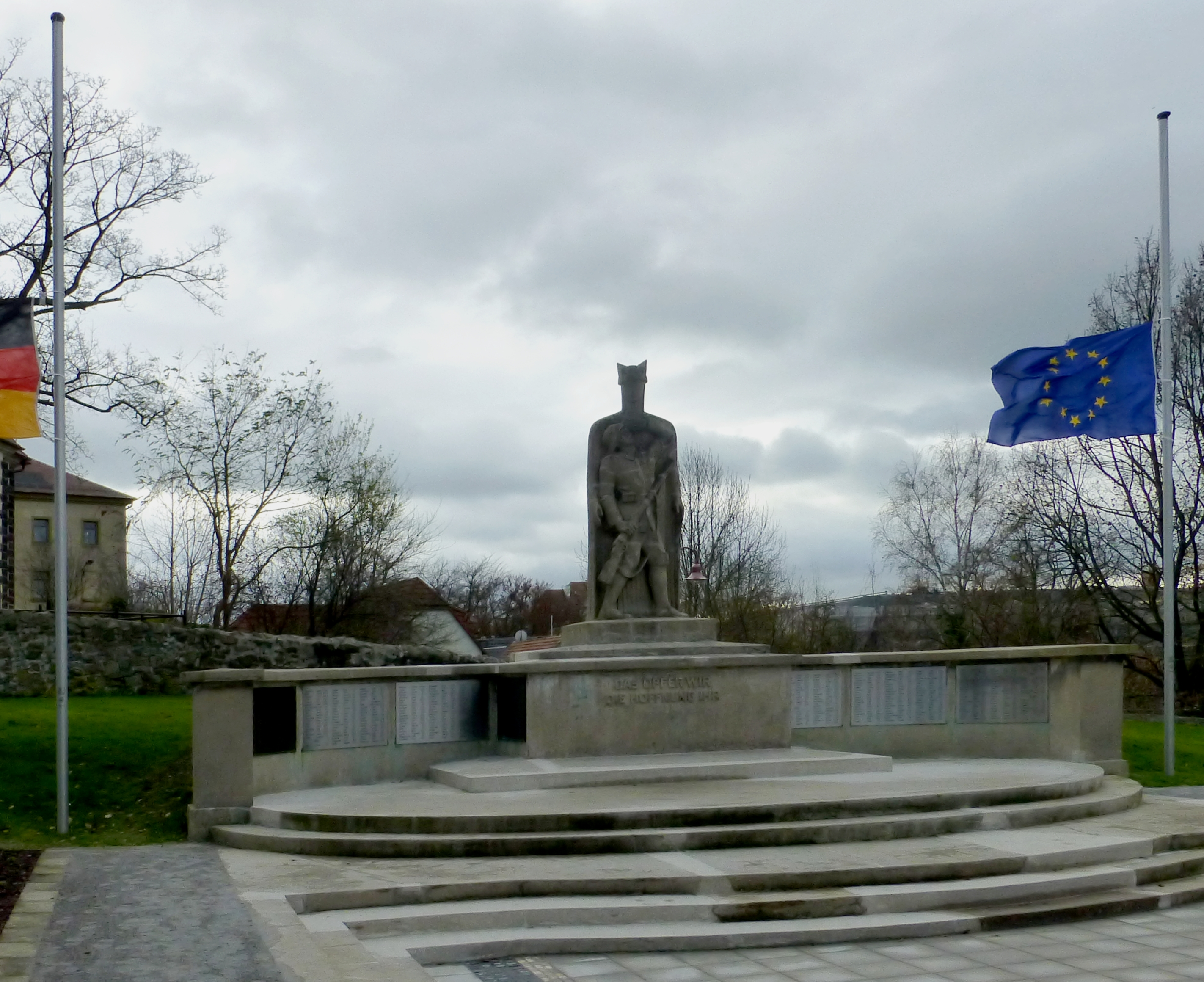 Kriegerdenkmal 1927 Radeberg restauriert, eingeweiht 19. November 2017